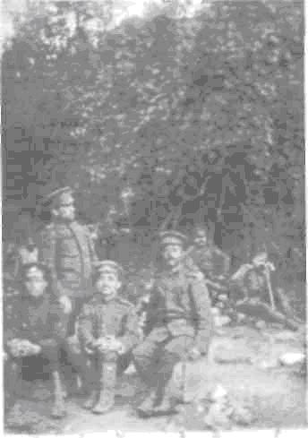 Петър Мартулков и Климент Скопаков.